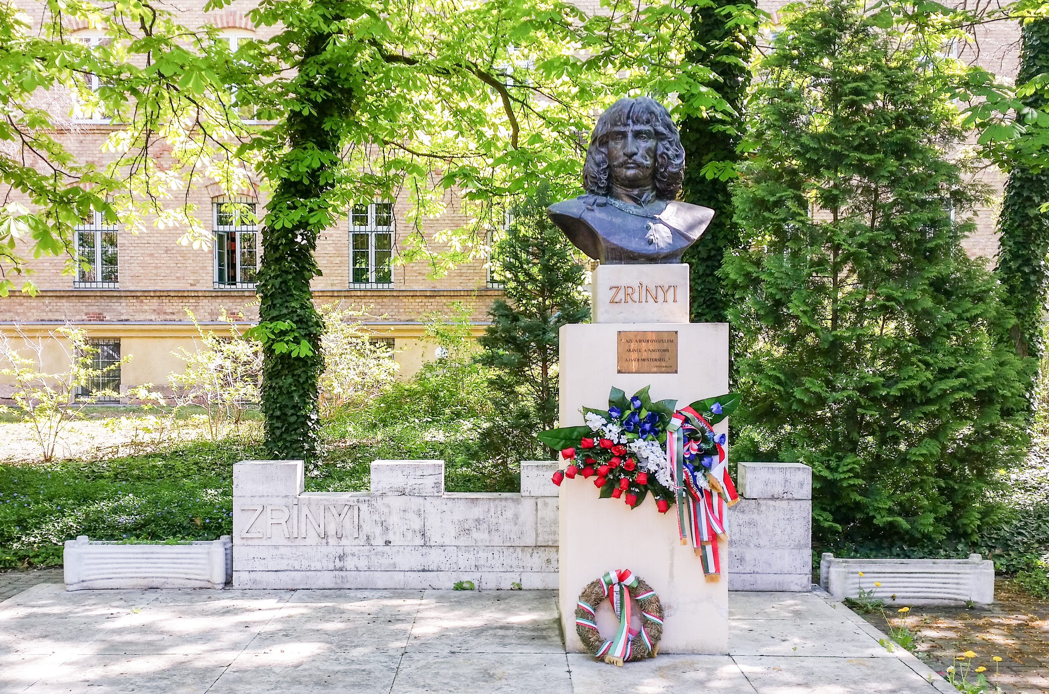 Bust of Miklós Zrínyí at the Miklós Zrínyi Military Academy, Budapestlabel QS:Len,"Bust of Miklós Zrínyí at the Miklós Zrínyi Military Academy, Budapest" label QS:Lhu,"Zrínyi Miklós mellszobra a volt Zrínyi Miklós akadémia területén. Alkotó:Barba Péter, 2012, eredetileg: 1956, ez az alkotás egy rekonstrukció)"